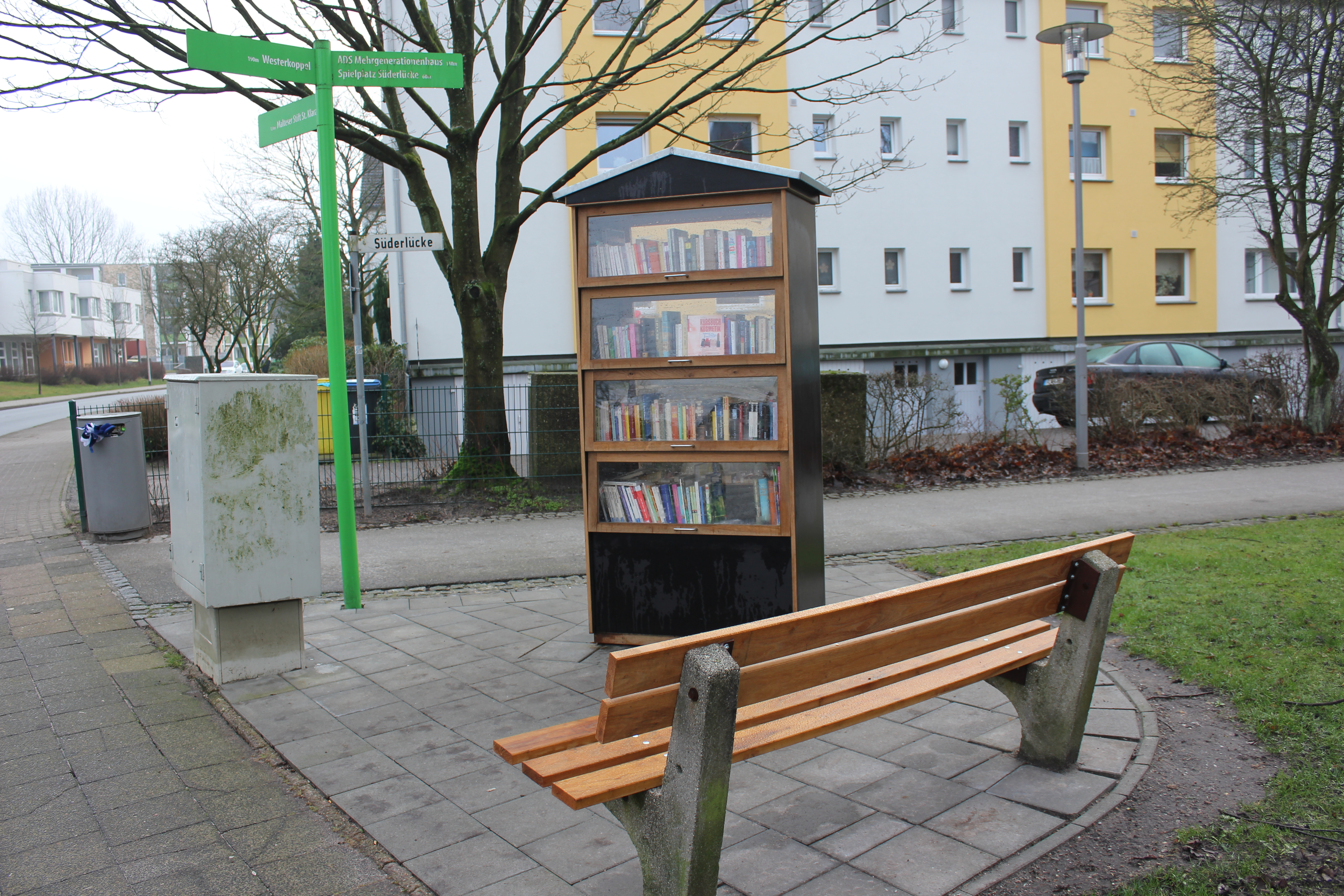 Bücherschrank beim Twedter Plack (Flensburg-Mürwik, Dezember 2013), Bild 07